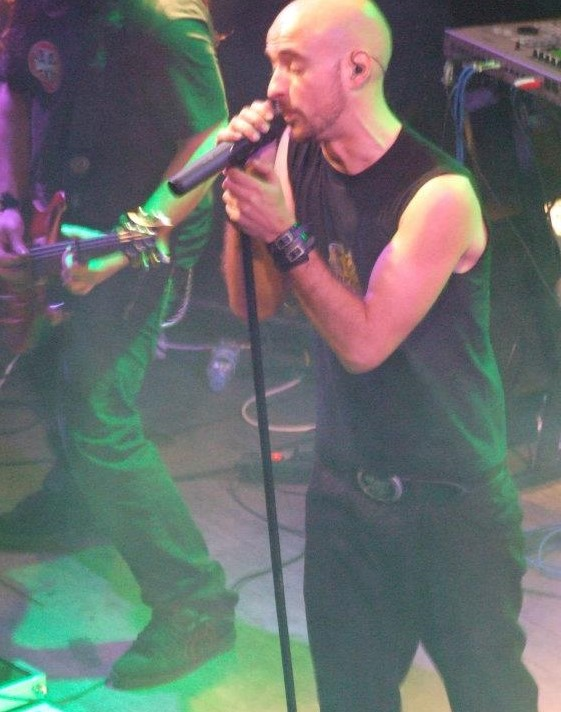 Enrique reyes